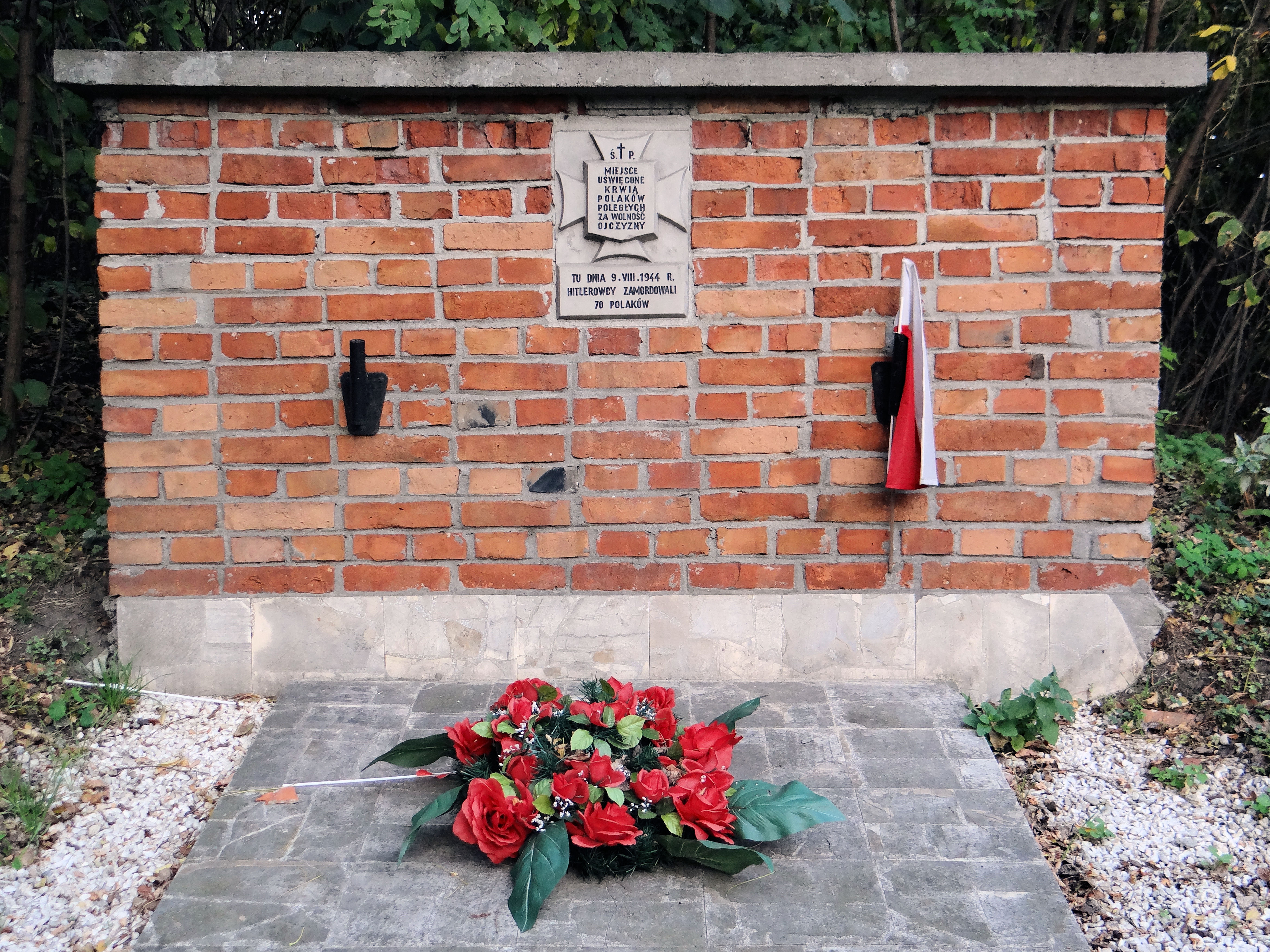 Miejsce pamięci przy ul Bema 57a